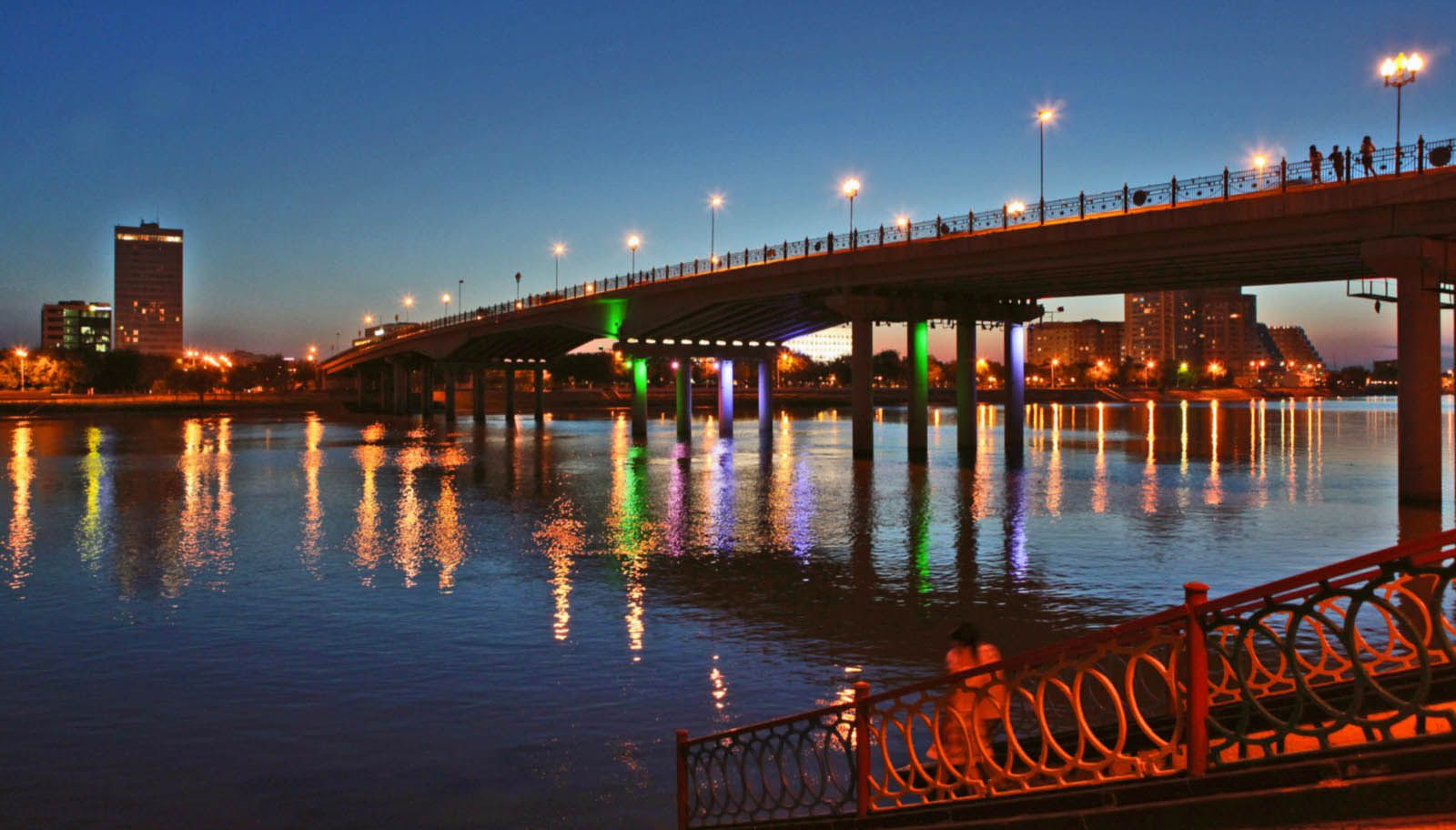 Река Урал в центре Атырау